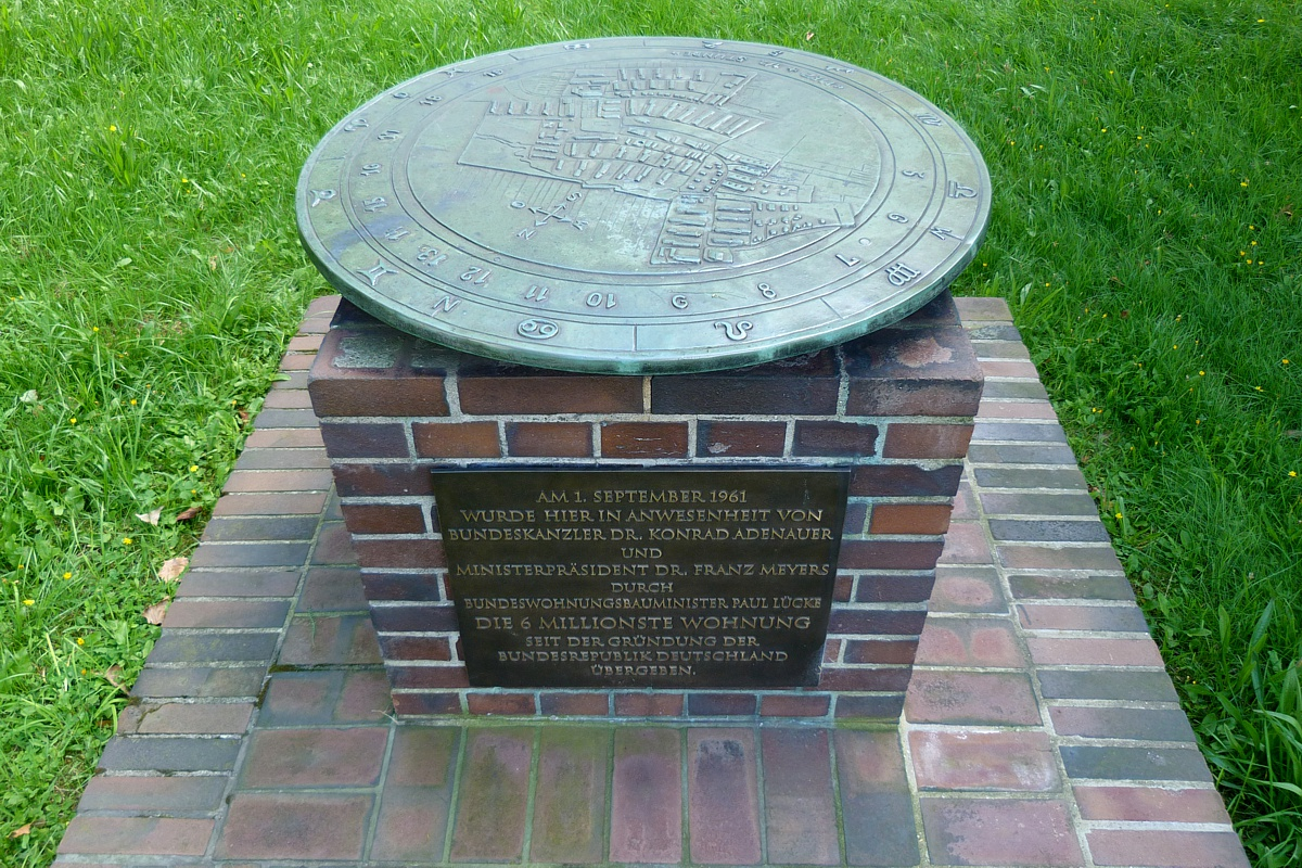 Denkmal mit Grundstein für die Parksiedlung Kippekausen, vorn Jubiläumstafel für die 6 Mio. Wohnung der BRD